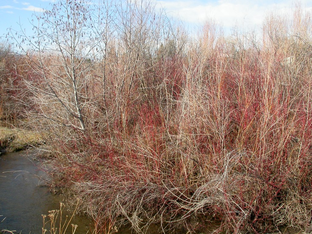 Alnus incana habitat